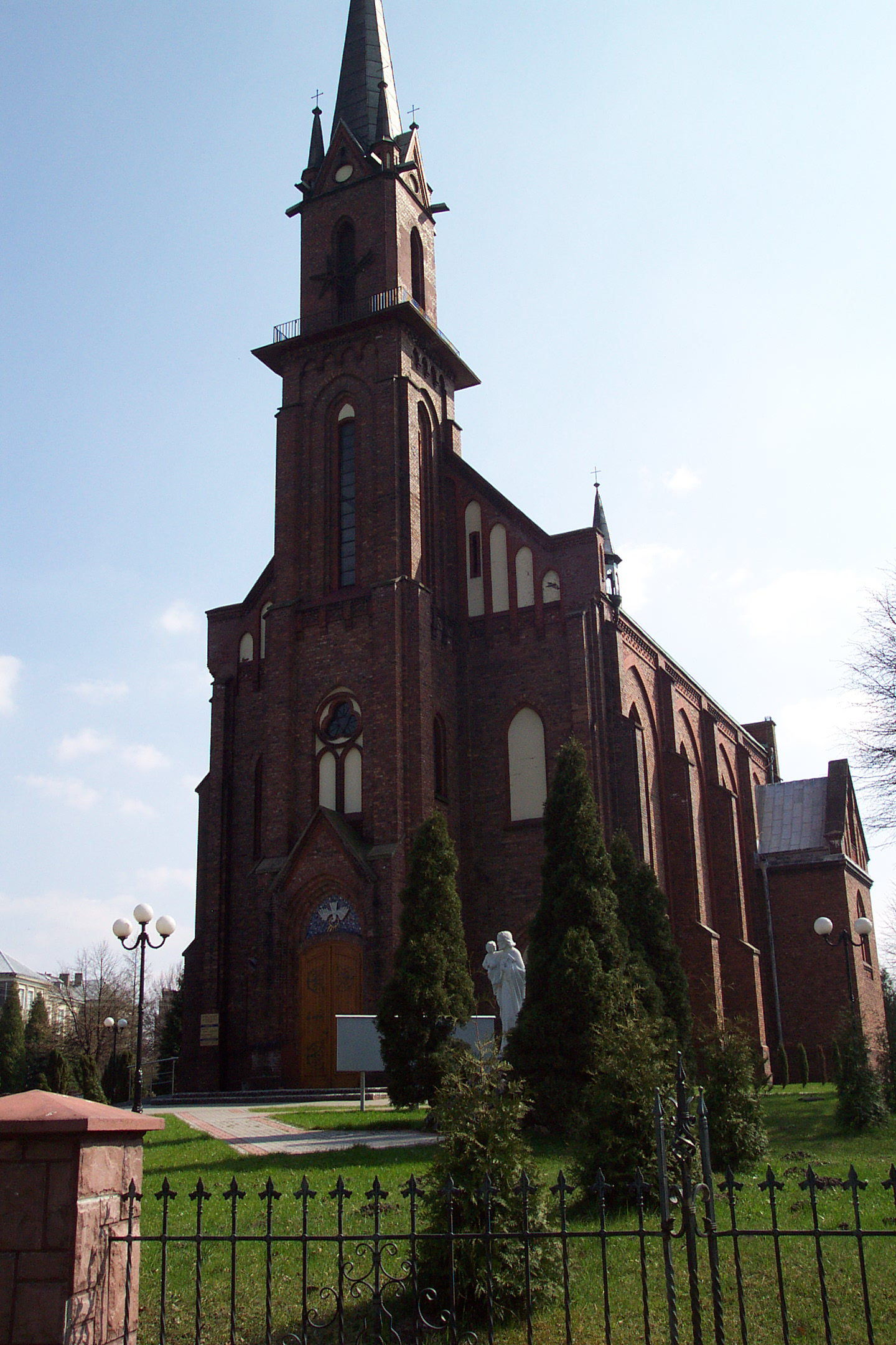 Kościół Świętego Józefa Oblubieńca NMP w Porębie, zdjęcie wykonane od strony północnej.